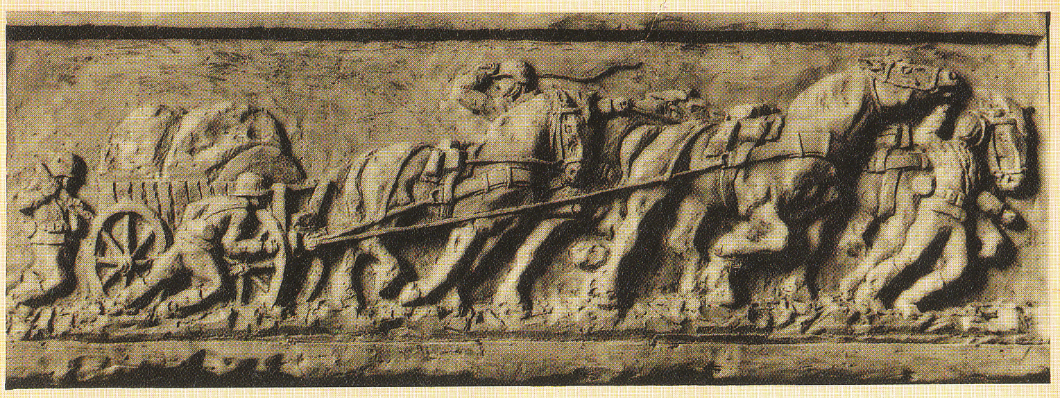 Eberhard Martin Schmidt, Relief "Nachschub", 1932